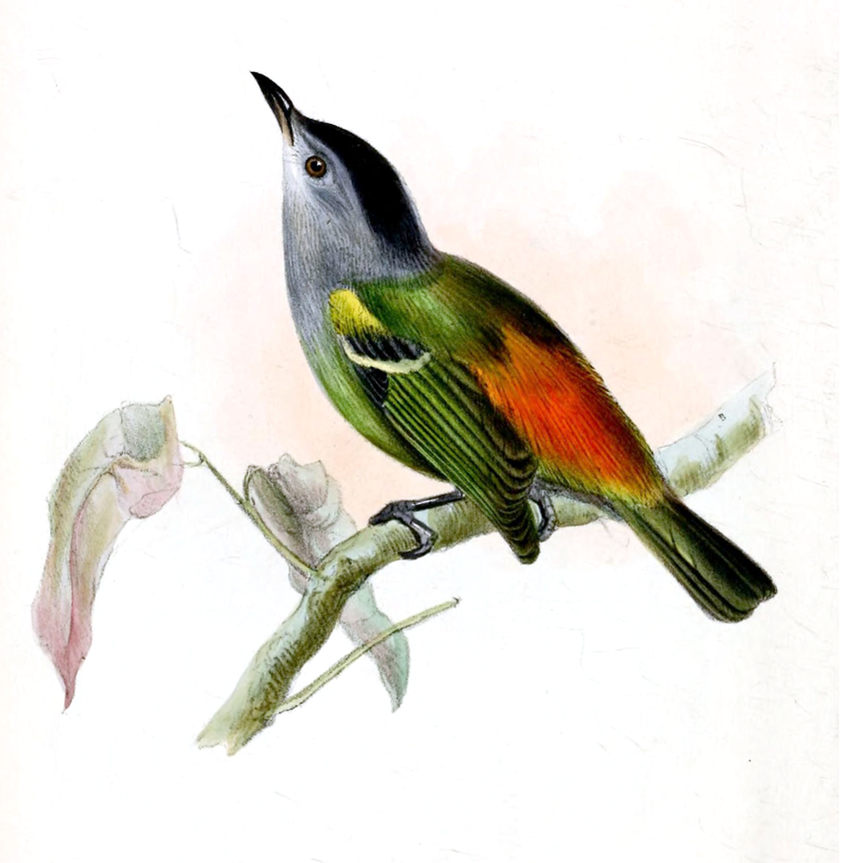 Formicivora callinota = Terenura callinota